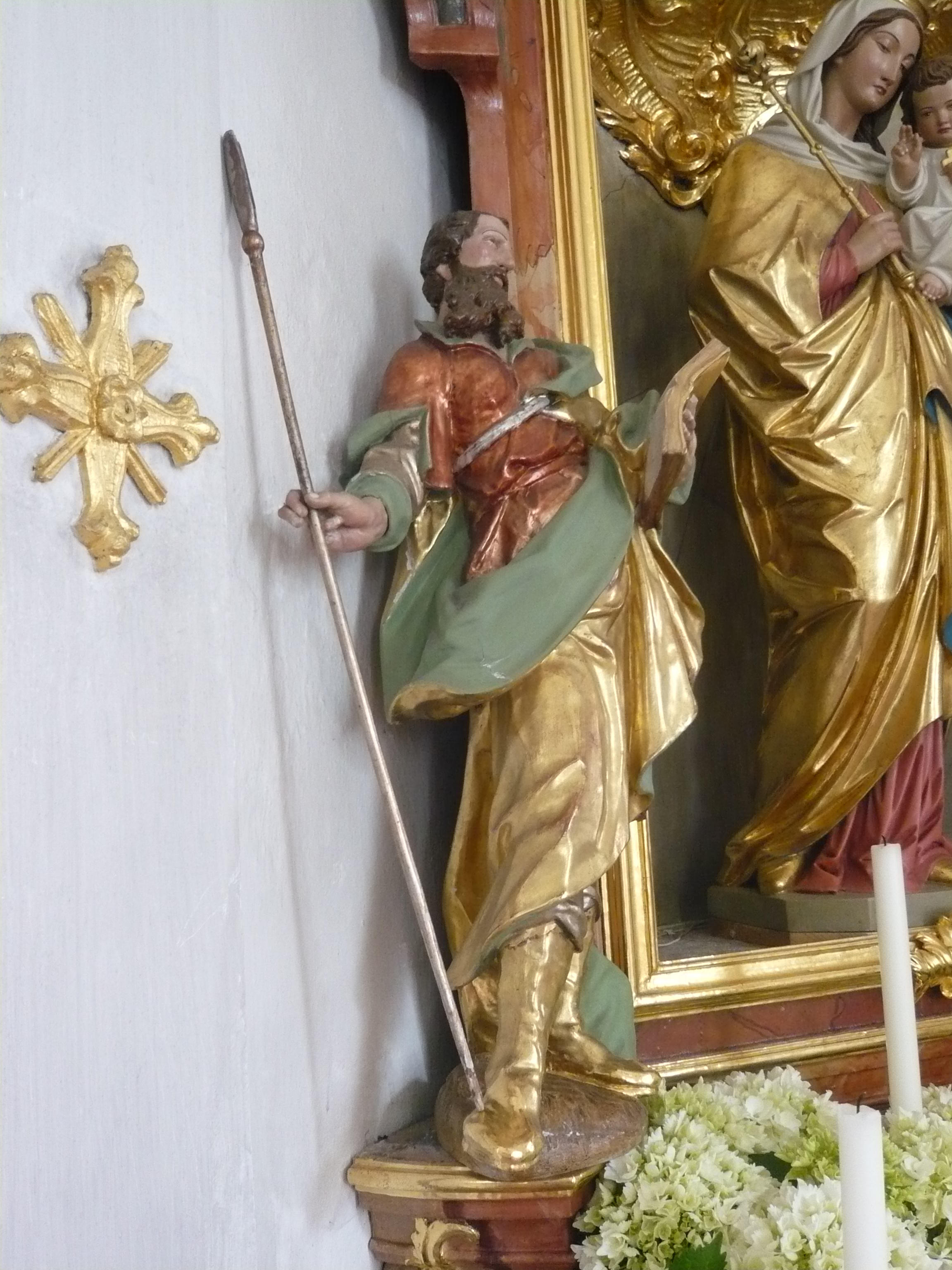 Hl. Joachim, St. Martin in Kappel, Gemeinde Pfronten, Ostallgäu